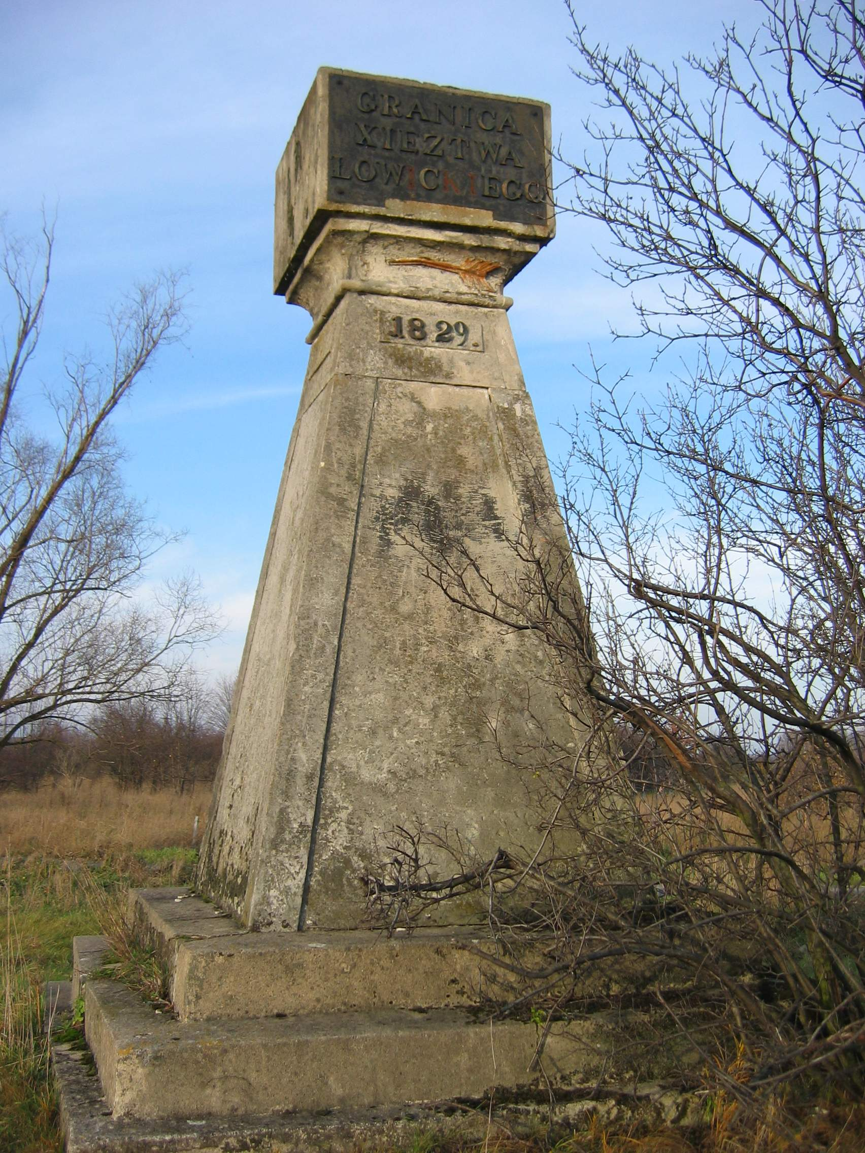 Demarcation of Dychy of Łowicz 1829 Image taken by User:Mathiasrex Maciej Szczepańczyk